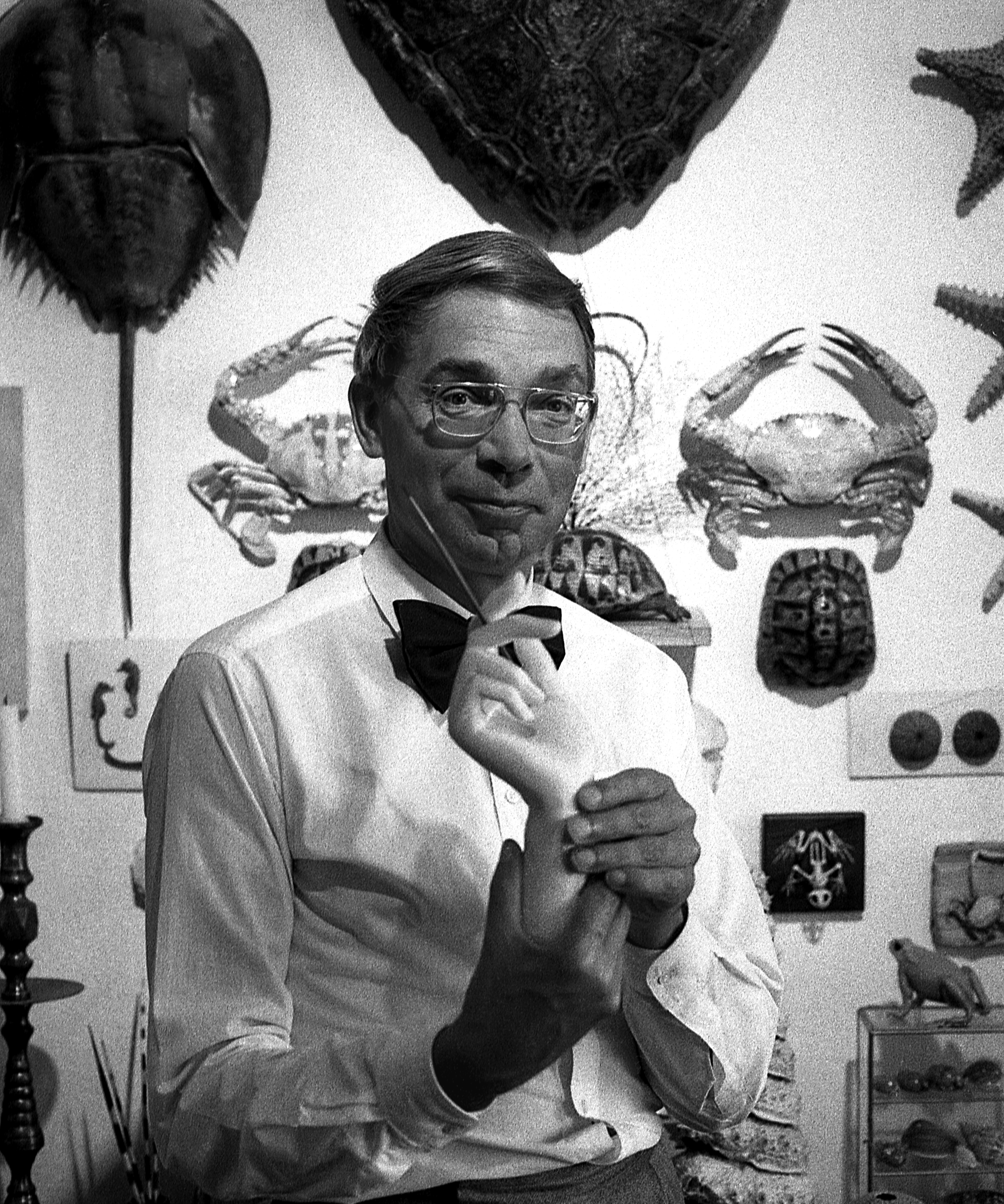 Maler